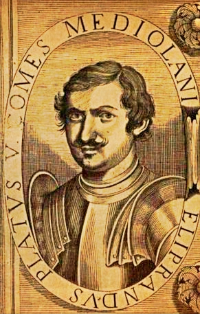 Eliprando Platoni Conde de Angheria y Señor, Vizconde y Príncipe de Milán